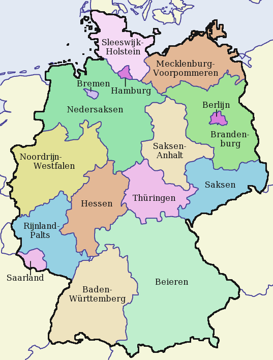 Duitsland met gekleurde deelstaten en -namen. Zelf gemaakt.